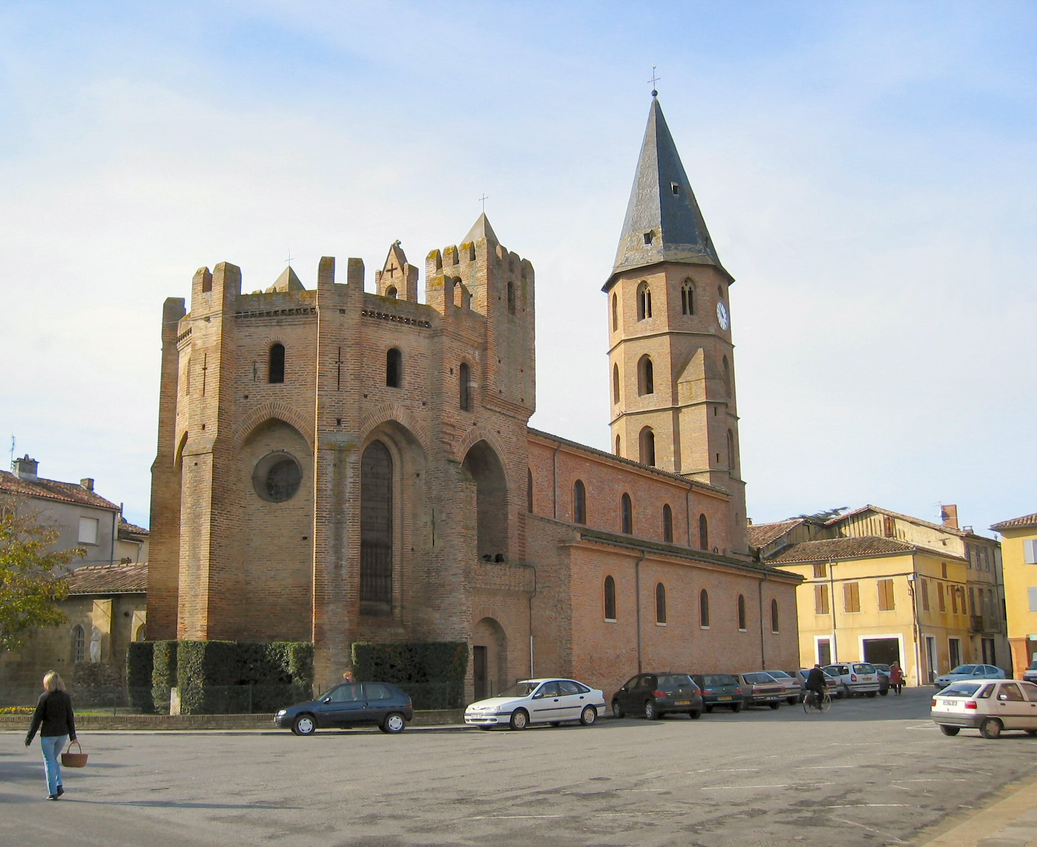 Isle-en-Dodon, L'Illa de Haut en occità